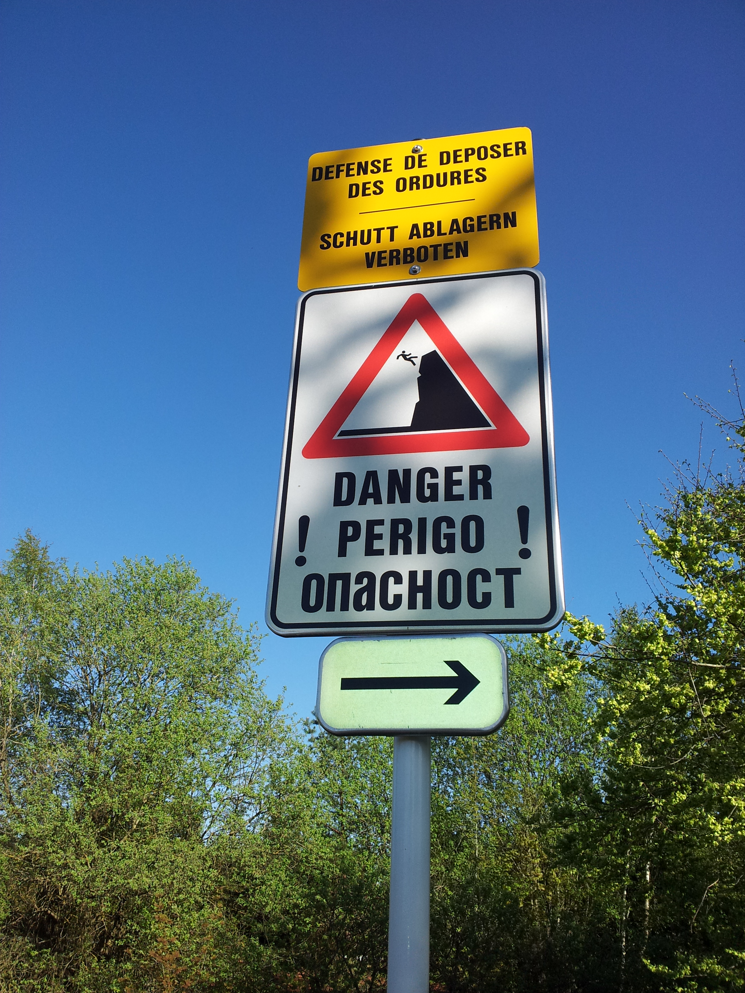 roadsign on Galgenberg in Esch-sur-Alzette